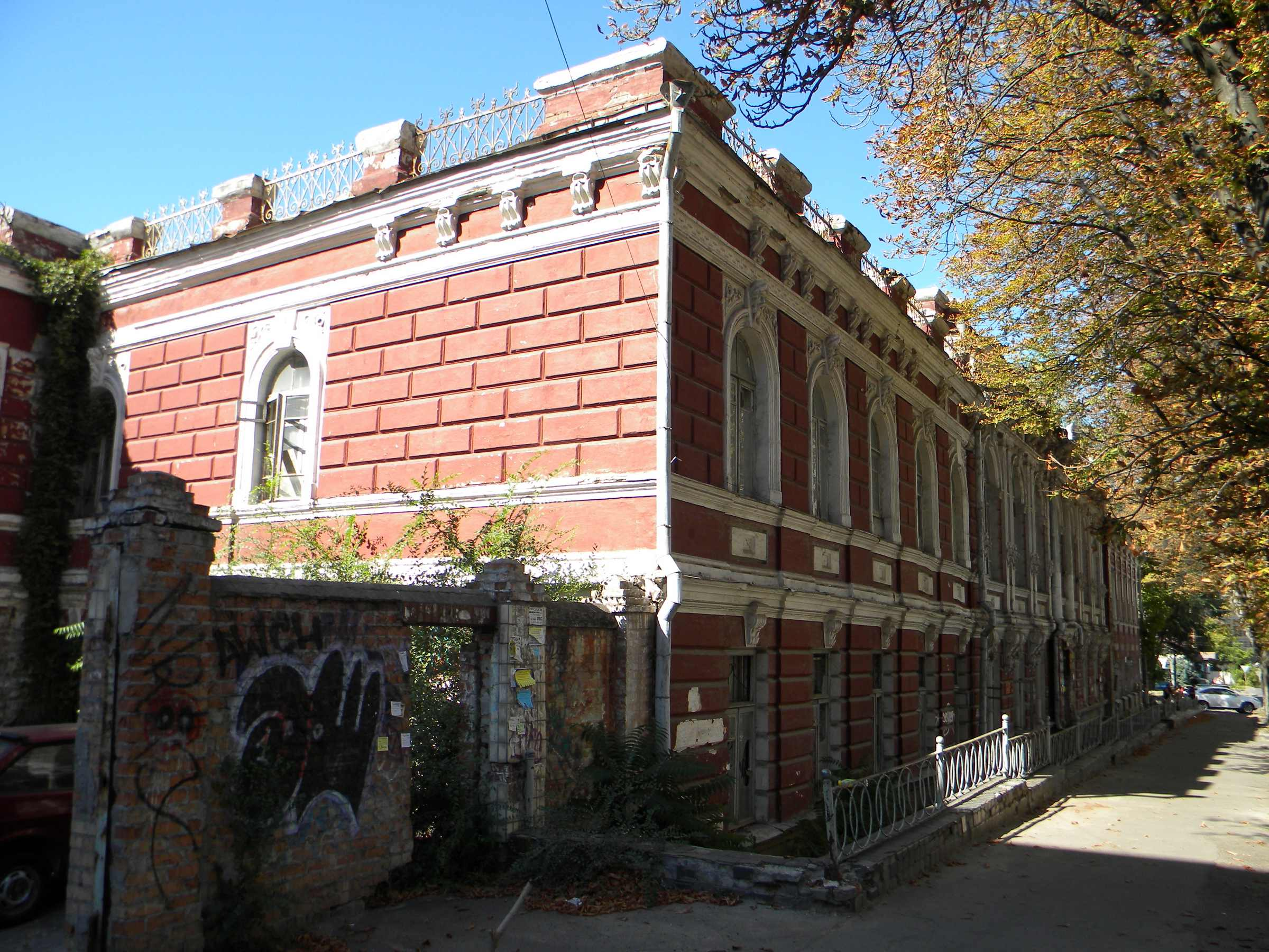 Губернська земська управа, Дніпро, узв. Крутогірний, 21